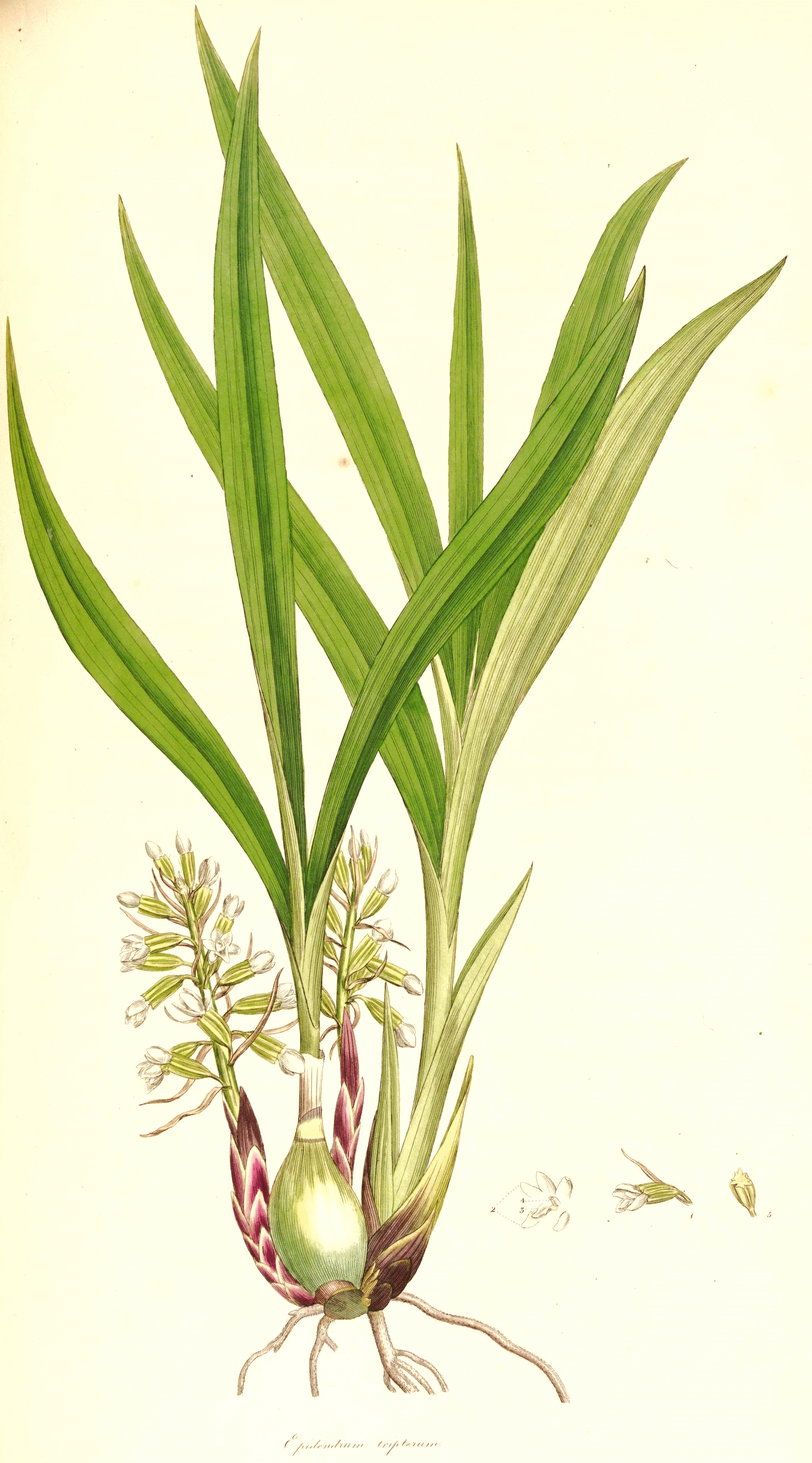 Coelia triptera (as syn. Epidendrum tripterum)